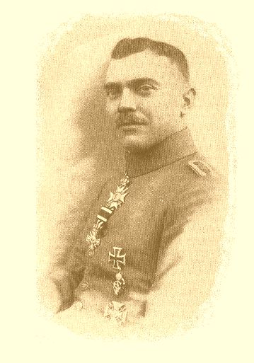 Portret van Prins Ferdinand, gestorven in 1918